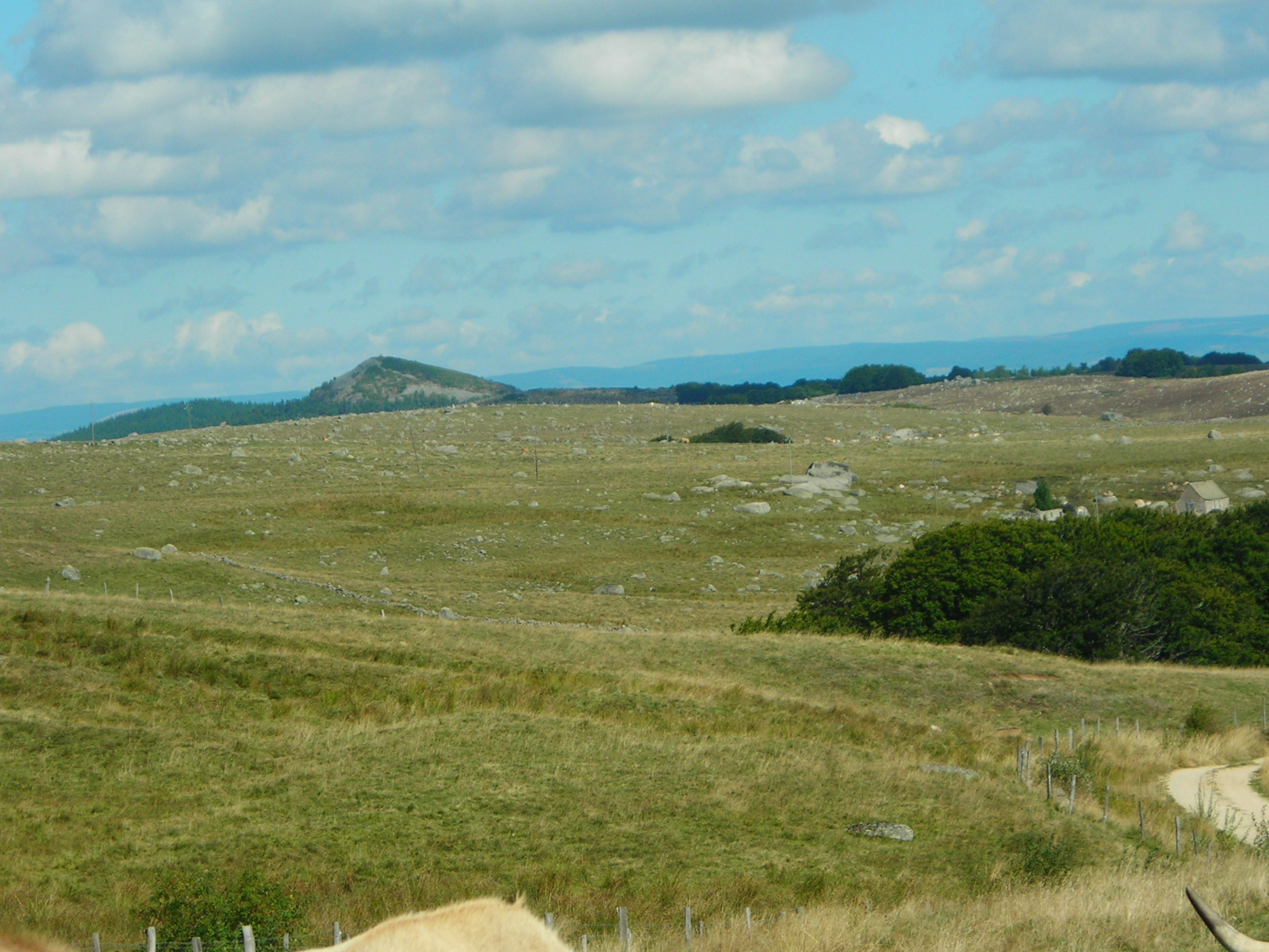 Le Pic de Mus vu de Rabios